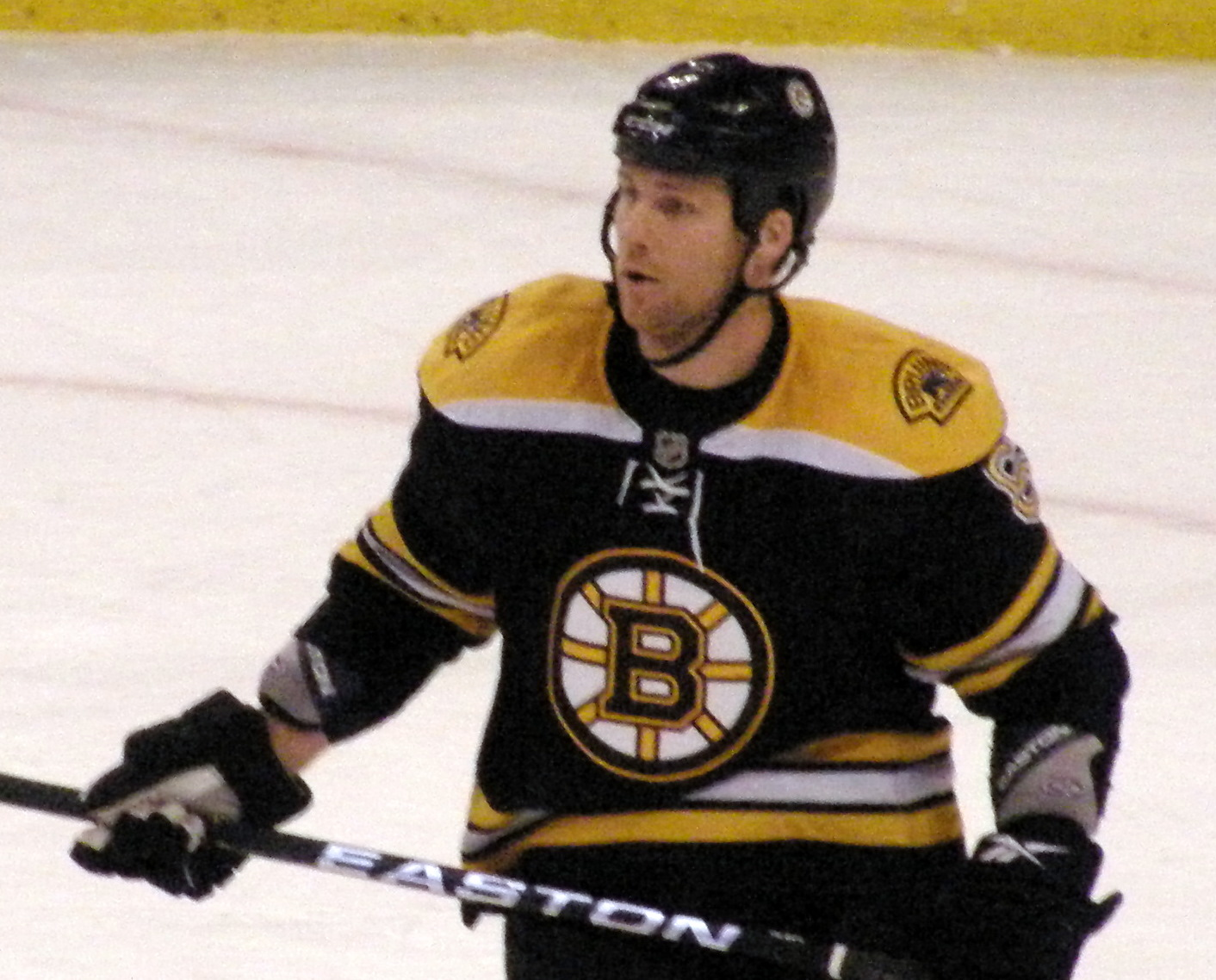 Dennis Wideman (D, BOS)